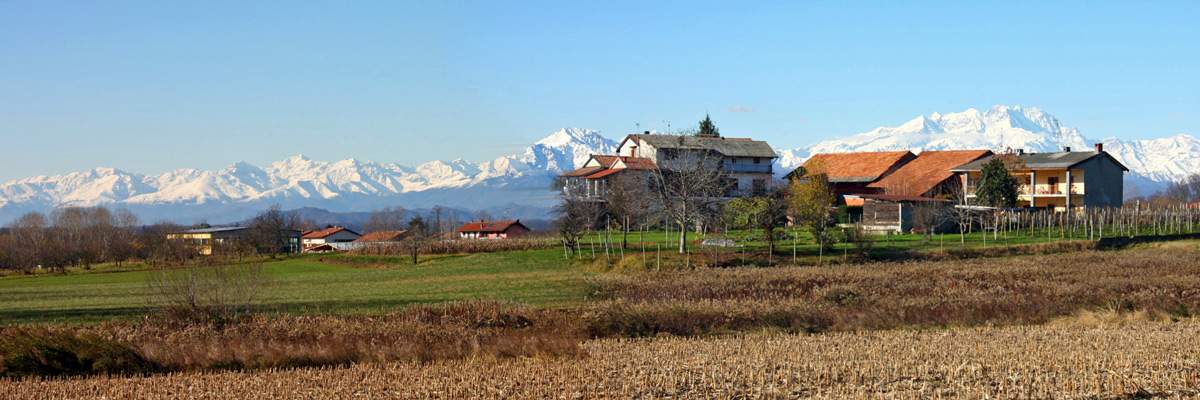 Panorama delle colline novaresi nei pressi di Suno (NO). Alle spalle le Alpi e il Monte Rosa